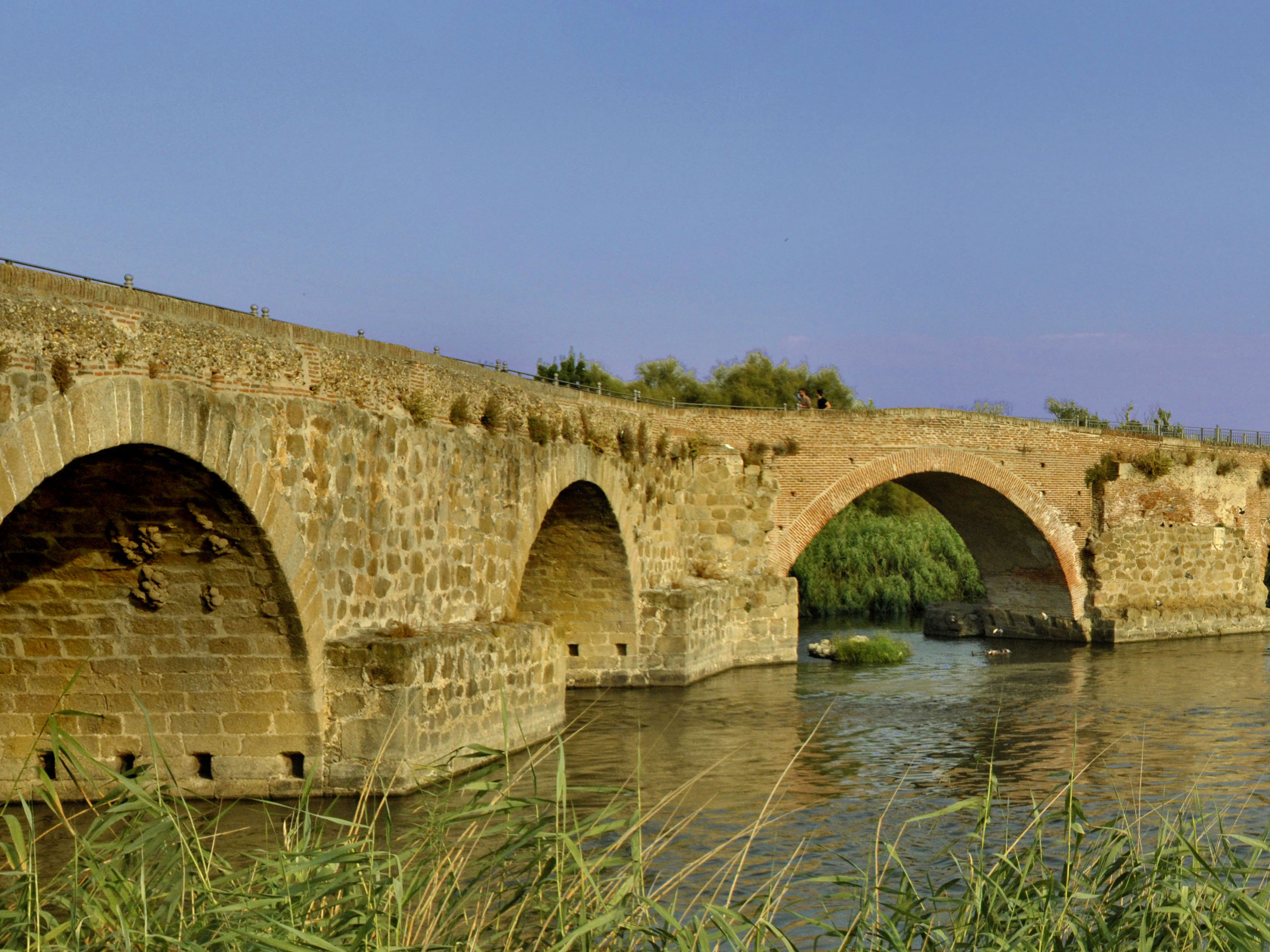 Puente viejo de Talavera